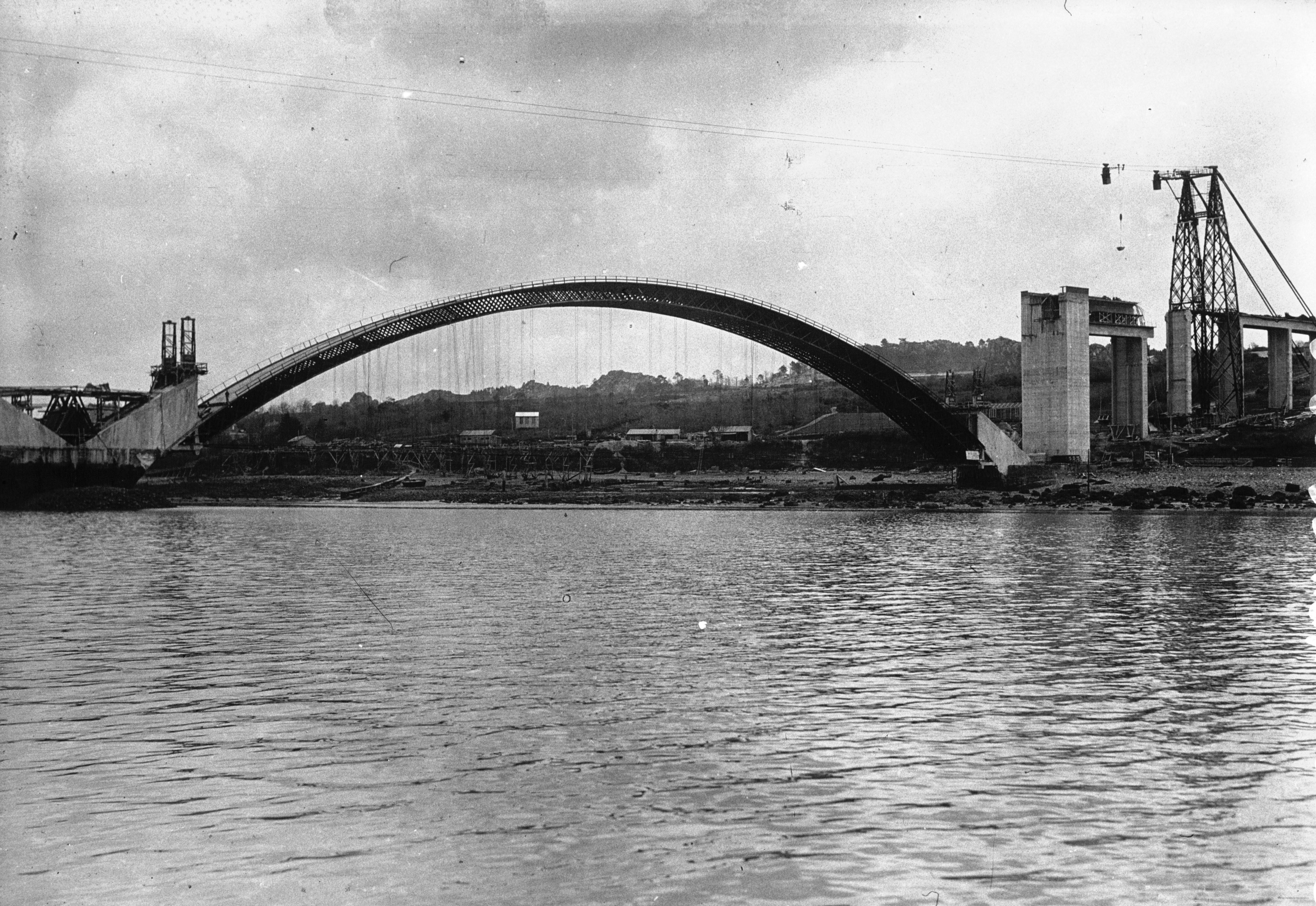 Le nouveau pont en ciment armé de Plougastel à Brest..